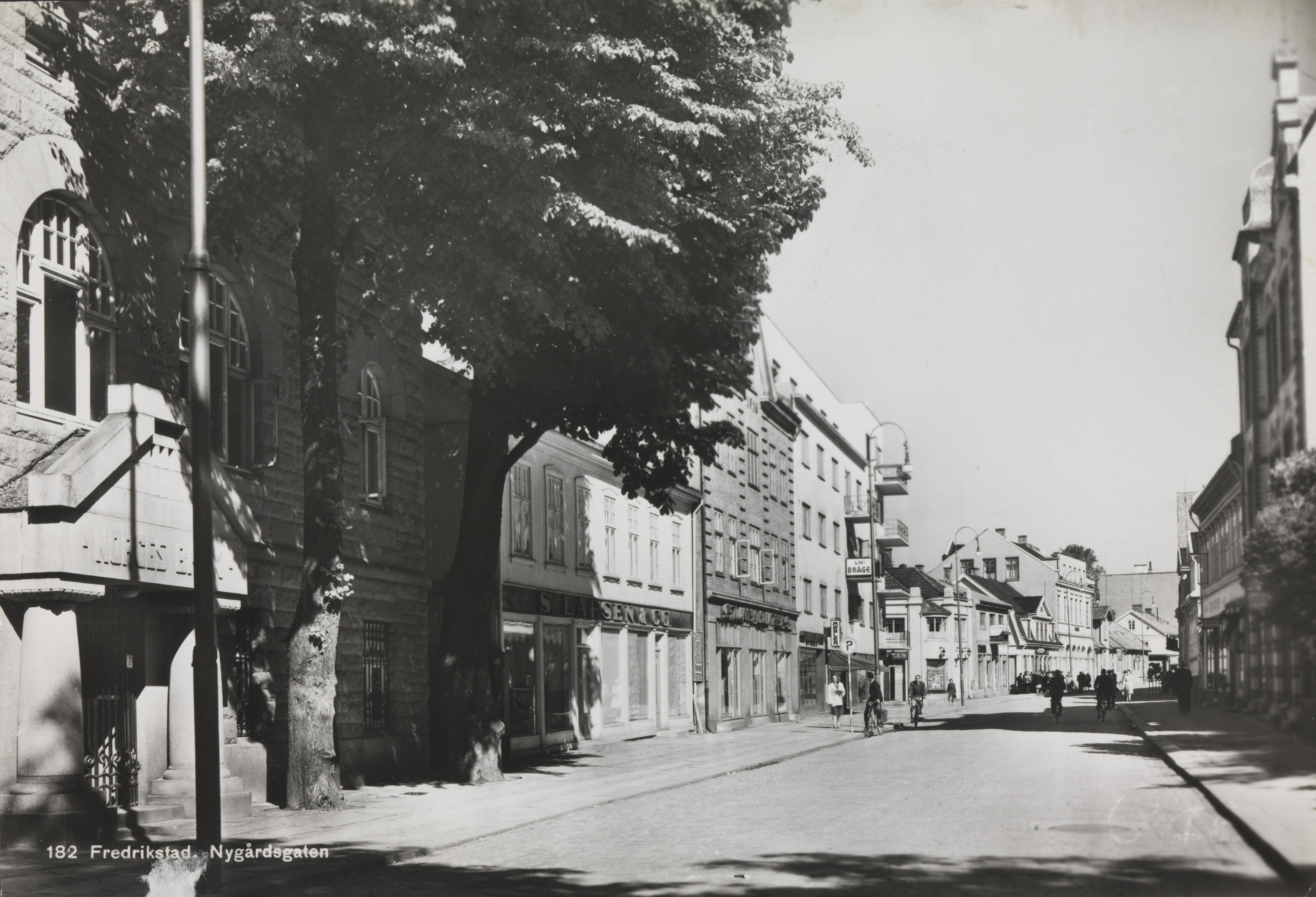 Bildet er hentet fra Nasjonalbibliotekets bildesamling Vestsiden, Fredrikstad, Østfold